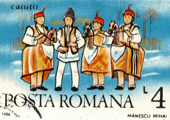 Caiutii, 1986, Mănescu Mihai Source: Post of Romania